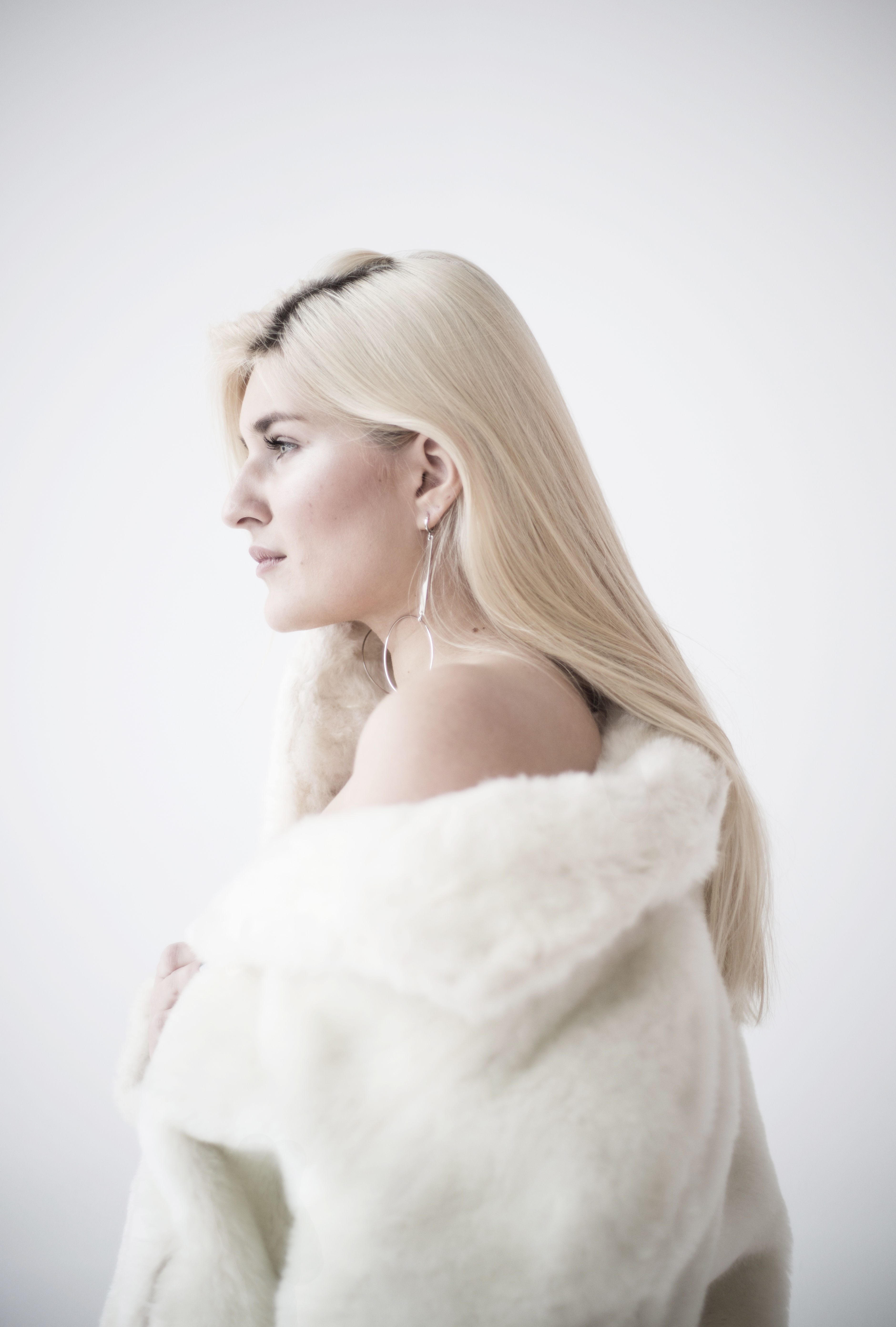 VAL New Shoot